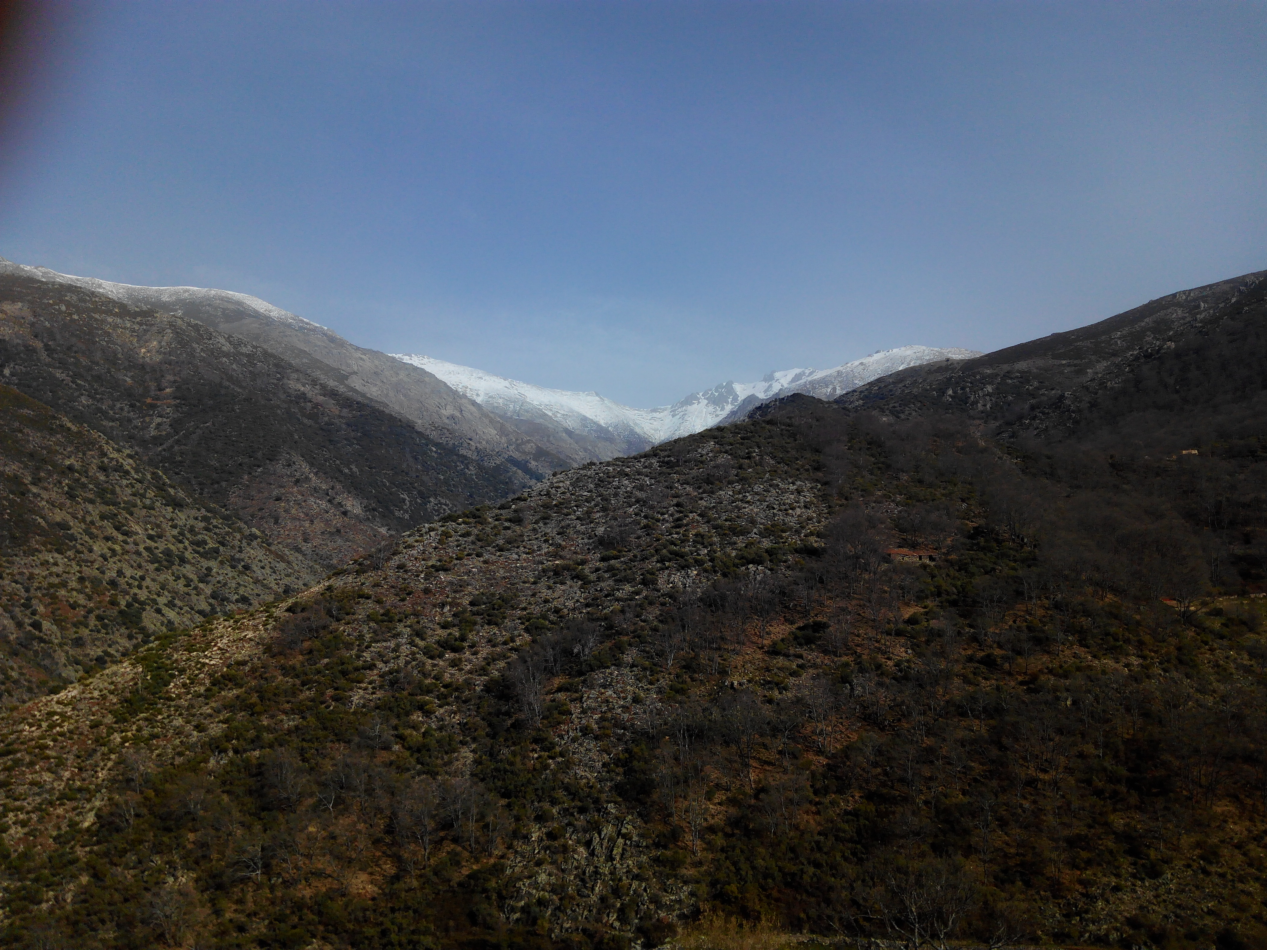 Sierra de Gredos y Valle del Jerte This is a photography of a Site of Community Importance in Spain with the ID: ES4320038. Natura2000 entry, EEA entry